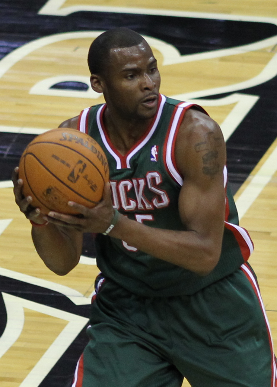 Wizards v/s Bucks 03/08/11